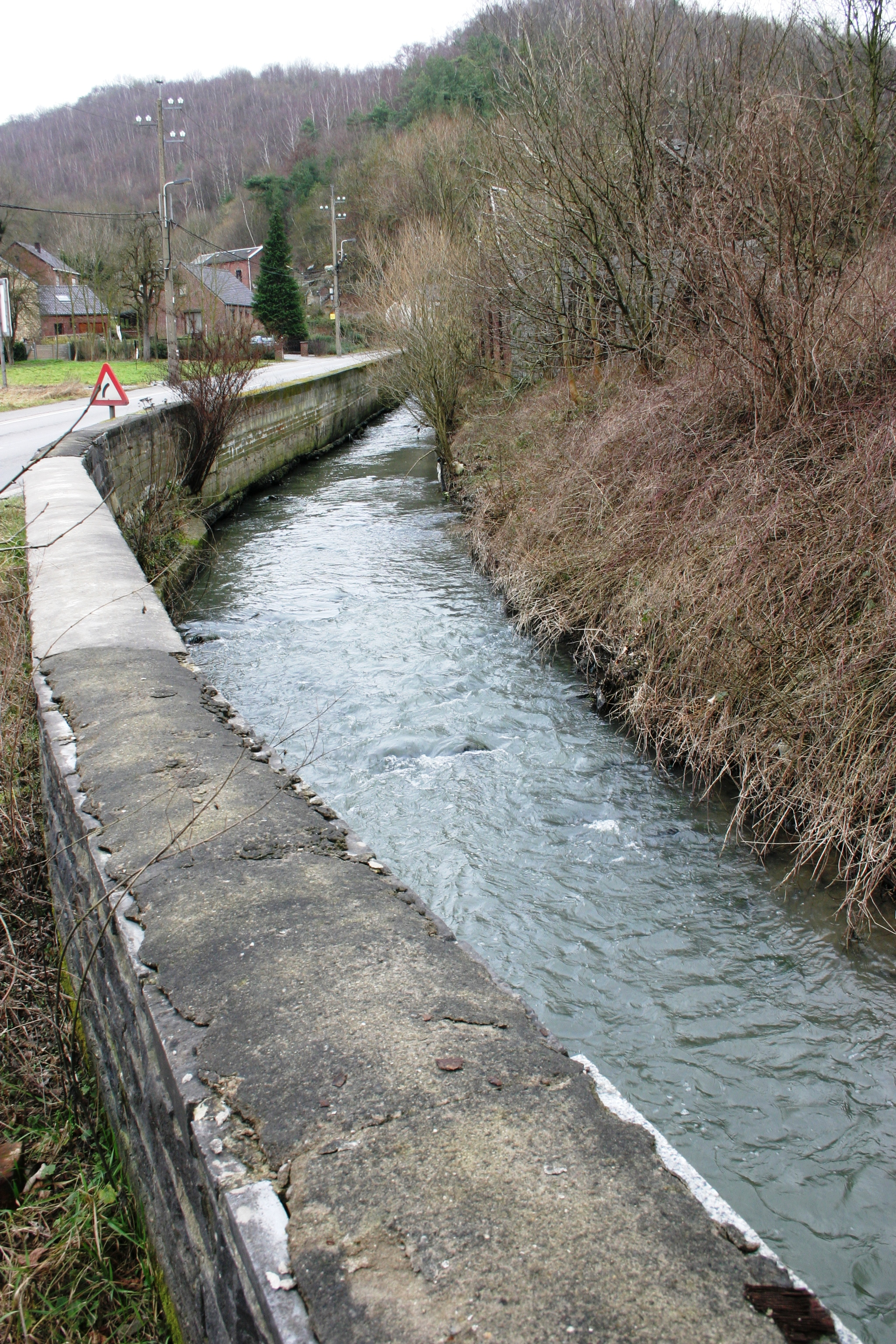 D'Magne an der Entrée vu Prayon.